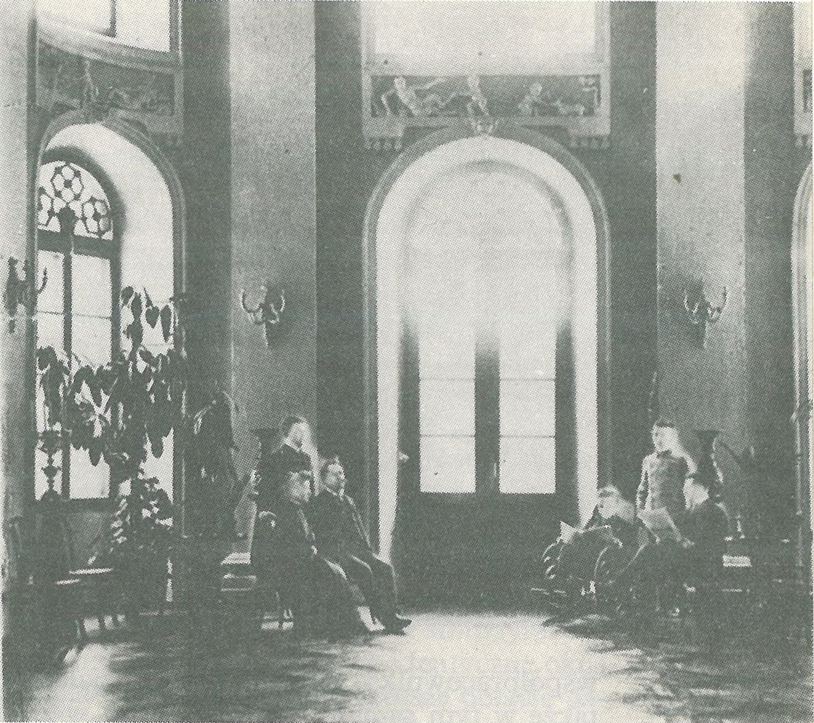 Беларуская (тарашкевіца): Сёмкаў Саламярэцкі (Siomkaŭ Sałamiarecki), сядзіба Хмараў (Chmara)